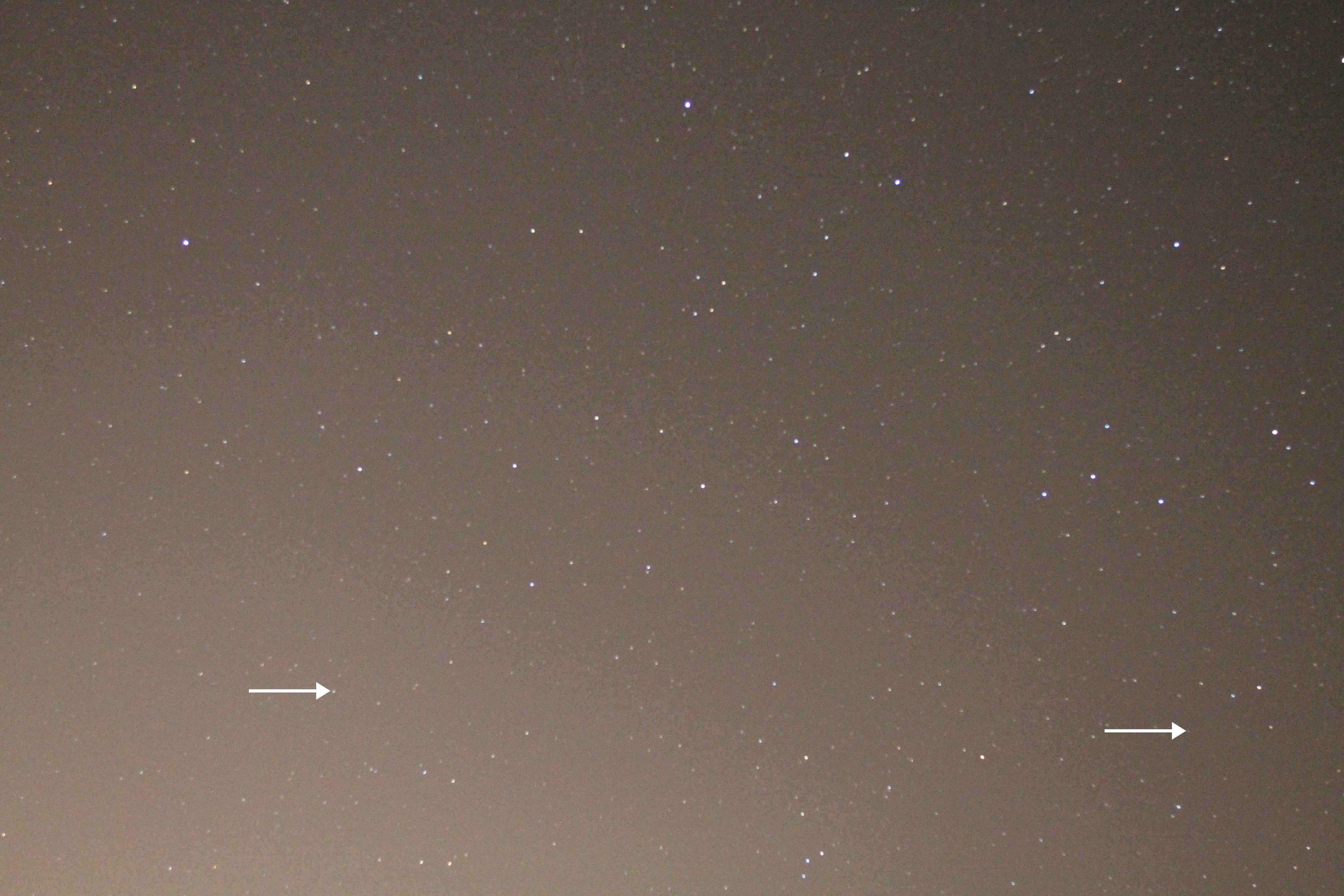 Uranus im Sternbild Fische. Uranus ist markiert durch den Pfeil in der linken Bildhälfte. Der Pfeil in der rechten Bildhälfte zeigt auf den Kleinplaneten Nausikaa